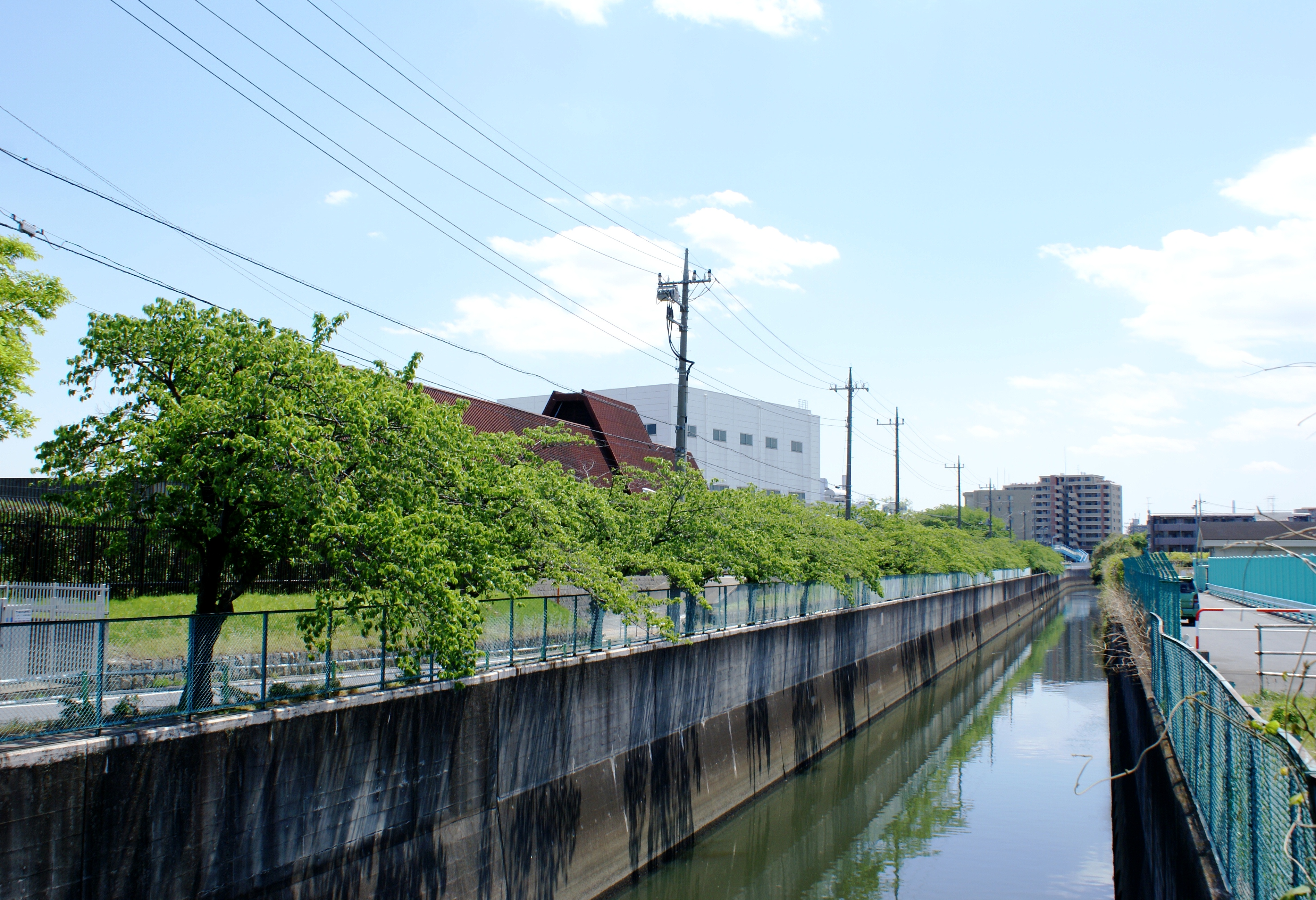 三園二丁目の白子川